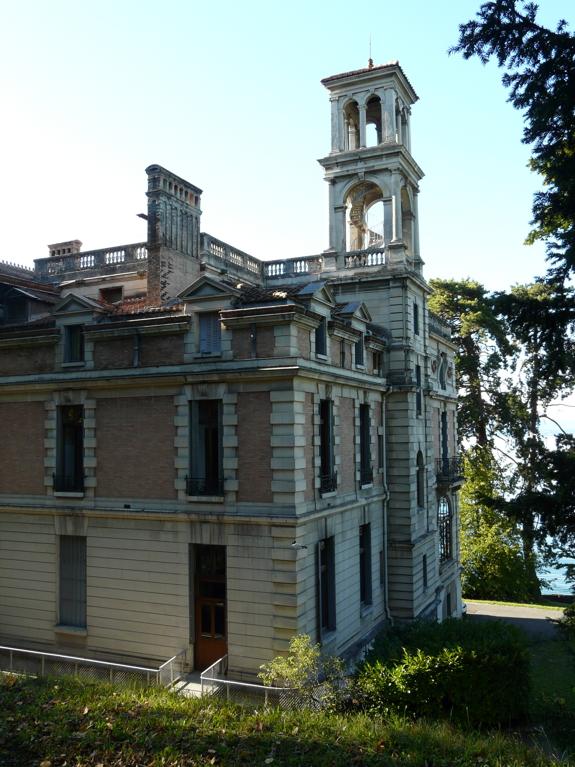 Villa La Sapinère d'Évian-les-Bains : façades sud et est